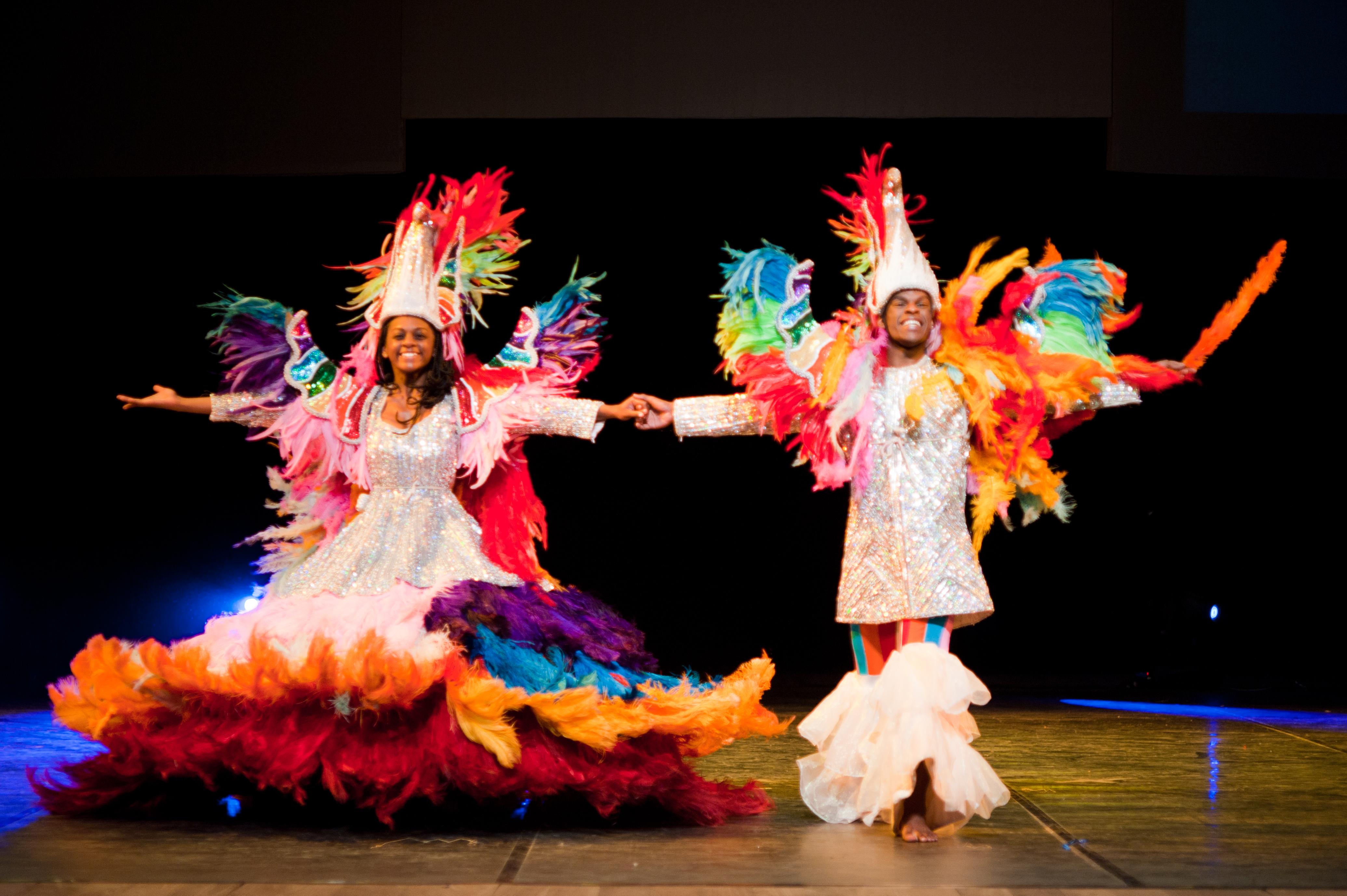 Cerimônia de Abertura da 34° Sessão do Comitê do Patrimônio Mundial na sala Villa Lobos no Teatro Nacional Cláudio Santoro. Foto: Pedro França/MinC